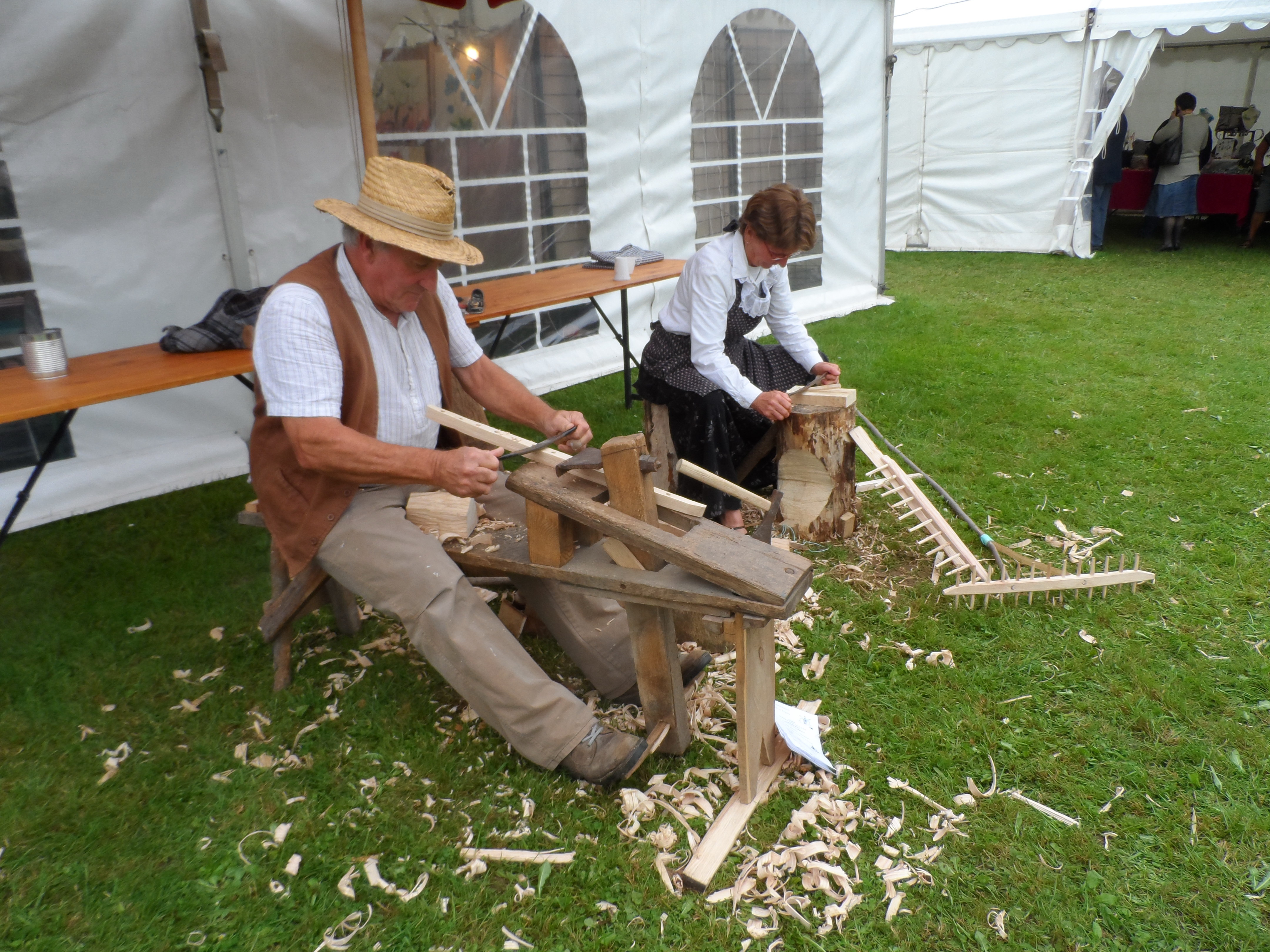 Fabrication rateau